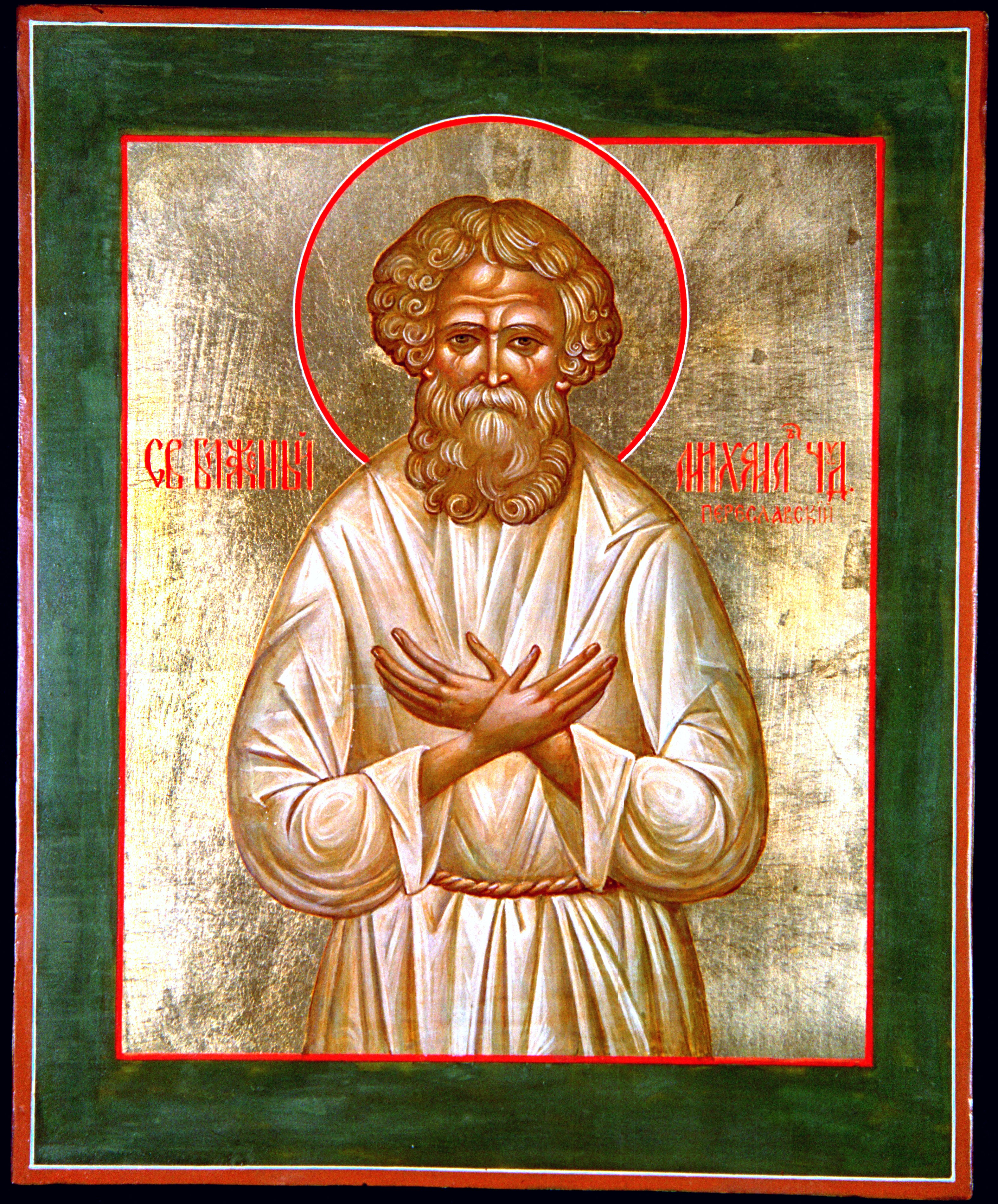 Икона Миши-Самуила